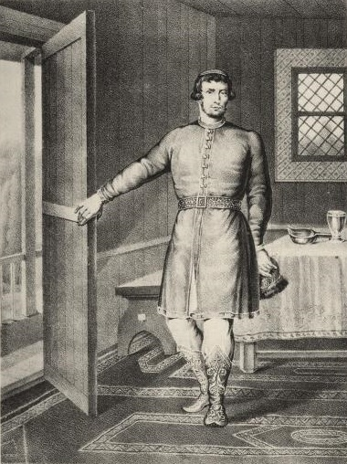 Русская одежда в XIV до XVIII столетия: зипун, тафья и шапка.